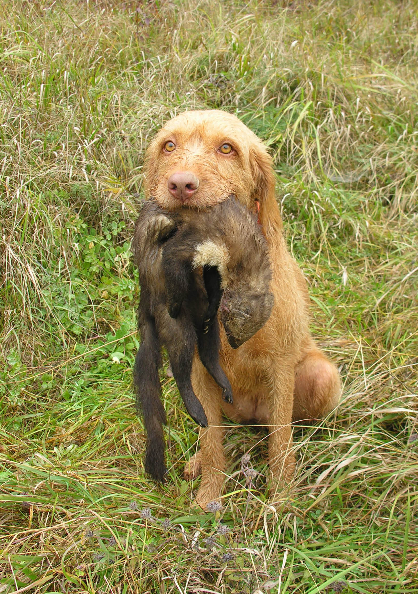 Magyar Vizsla Drahthaar